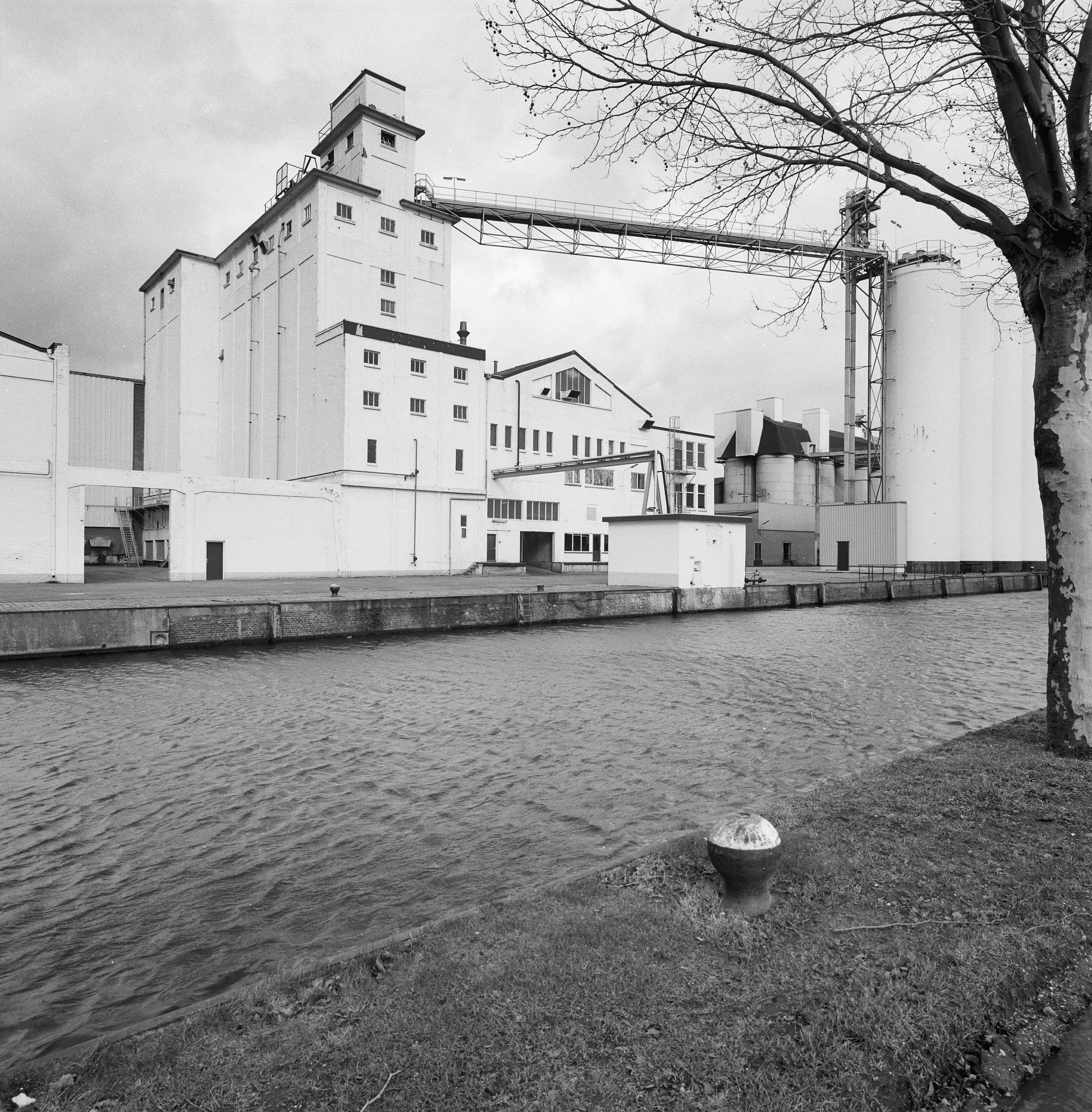 N.C.B-Complex: Overzicht veekoekenfabriek (opmerking: Gefotografeerd voor Monumenten In Nederland Noord-Brabant)